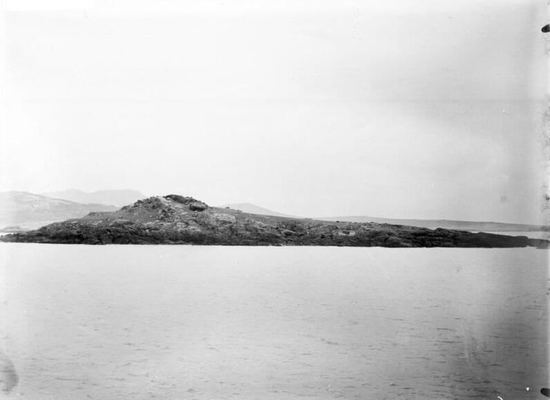 Schutzgebiet Kiautschou 1900: Arkona-Insel